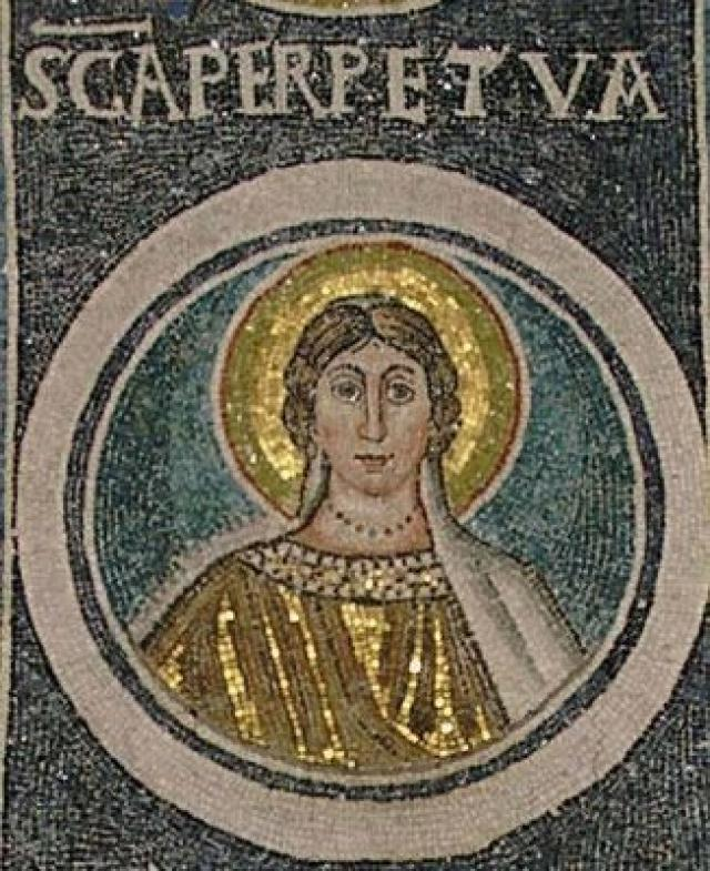 Mozaïek van de heilige Perpetua in de Euphrasiusbasiliek in Porec in Kroatië